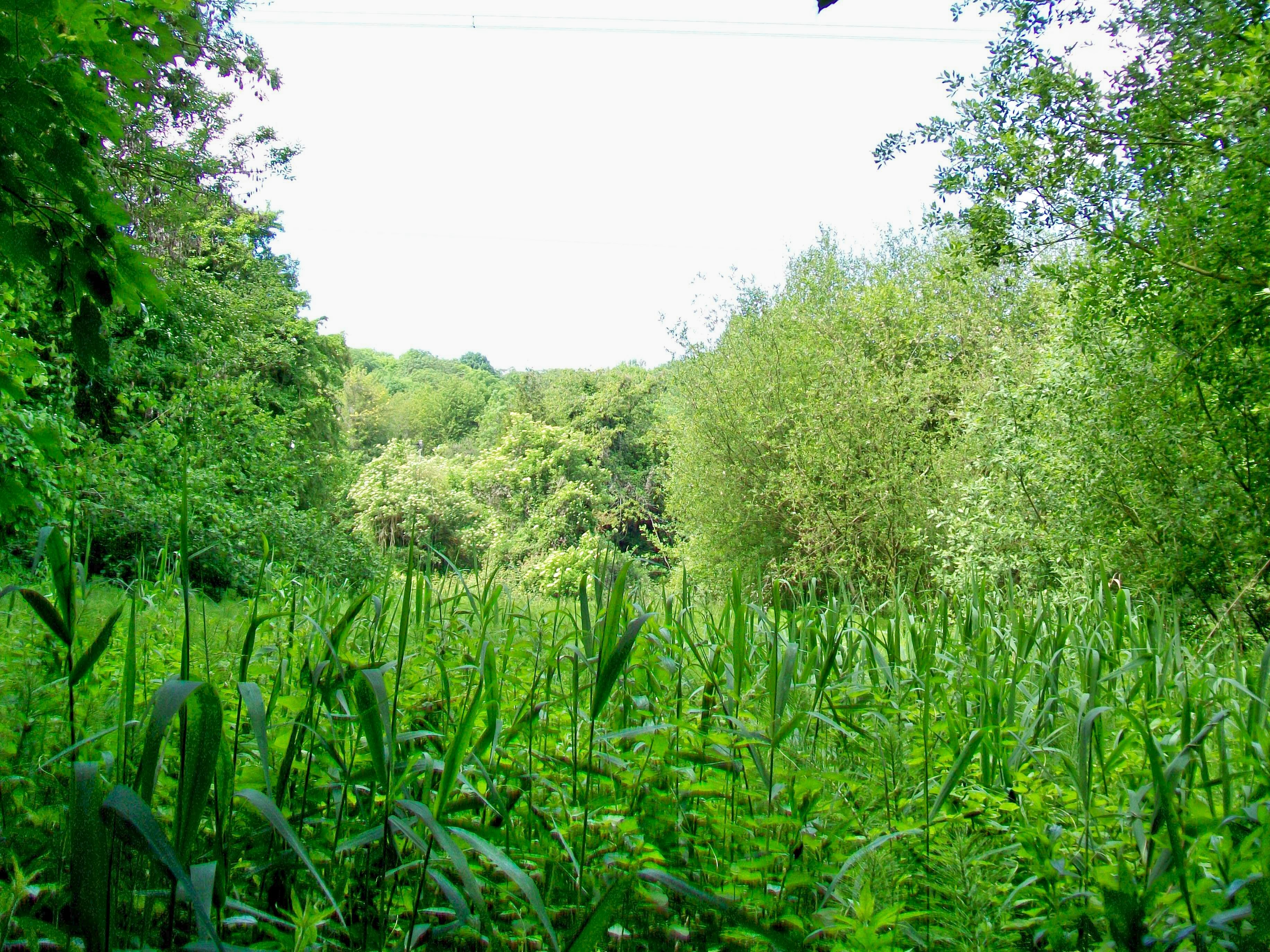 Le marais près de la fontaine aux Moines.